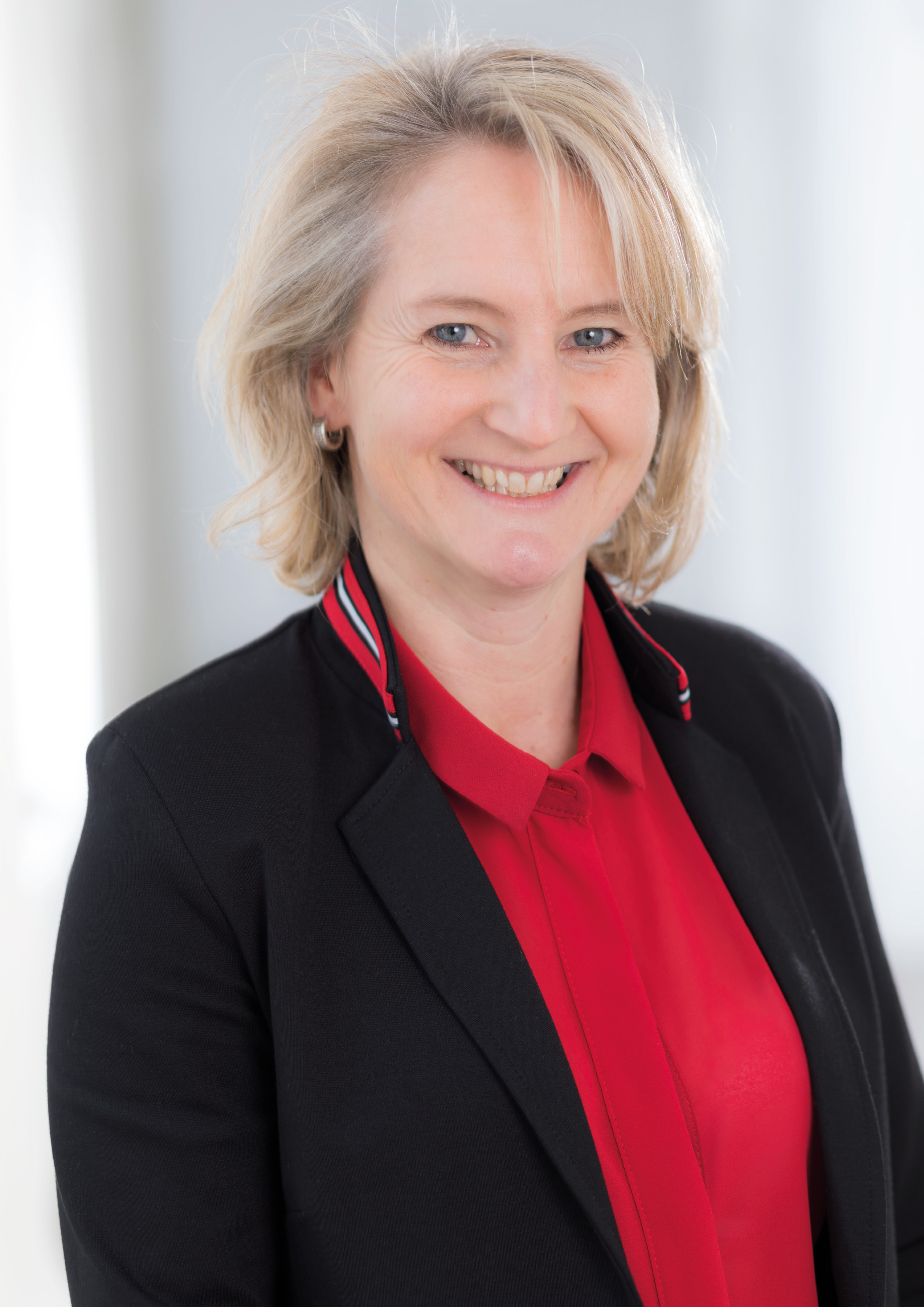 LA Claudia Hagsteiner